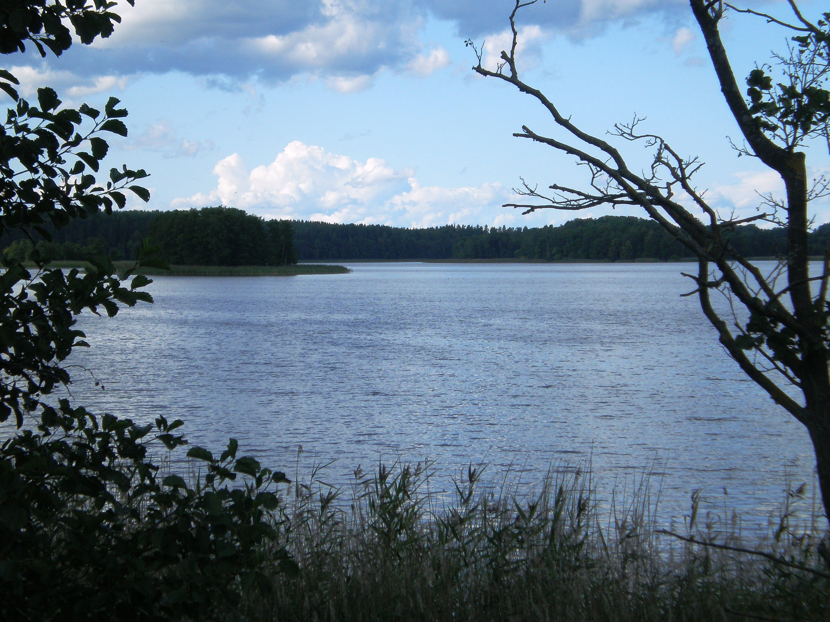 Lauces ezers, Zarasa raj., Lietuva